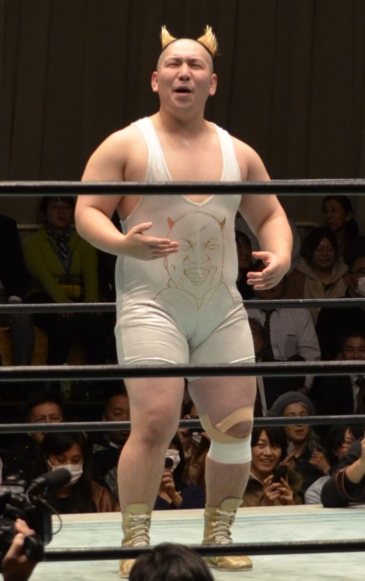 katuo